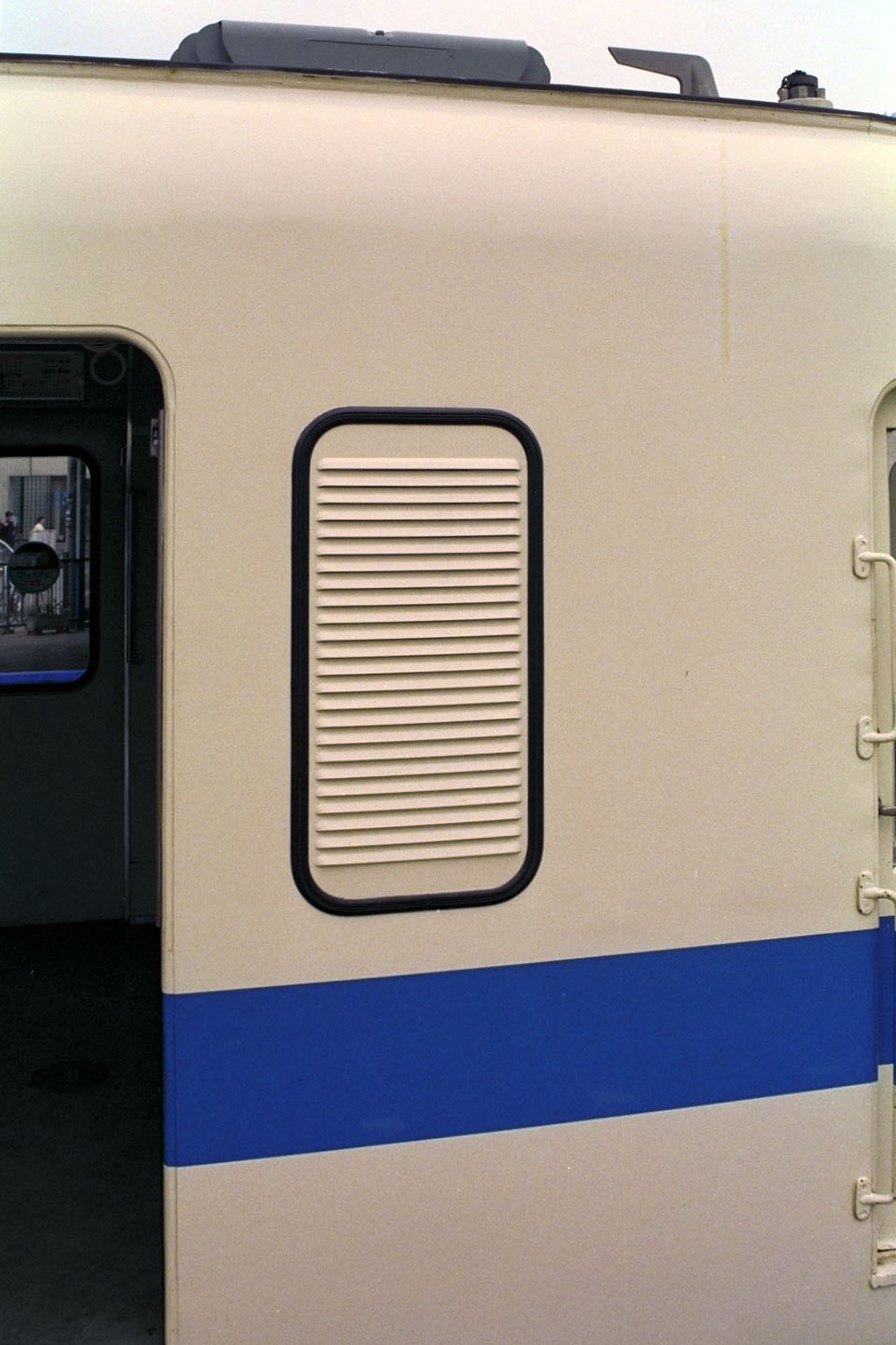 小田急クハ2450形、ルーバー（外側から撮影）